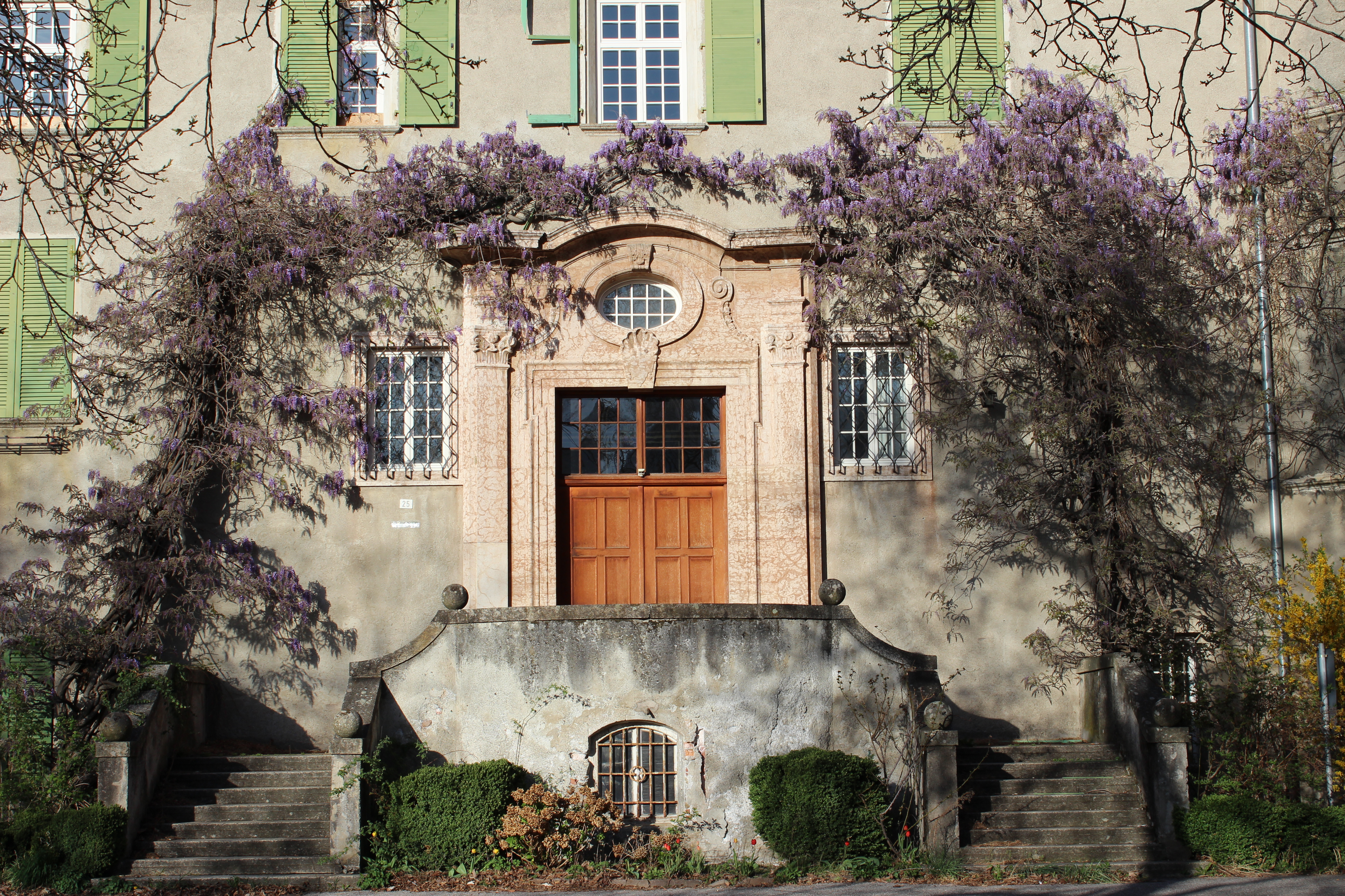 Bischöfliches Seminar Johanneum in Dorf Tirol, Haupteingang